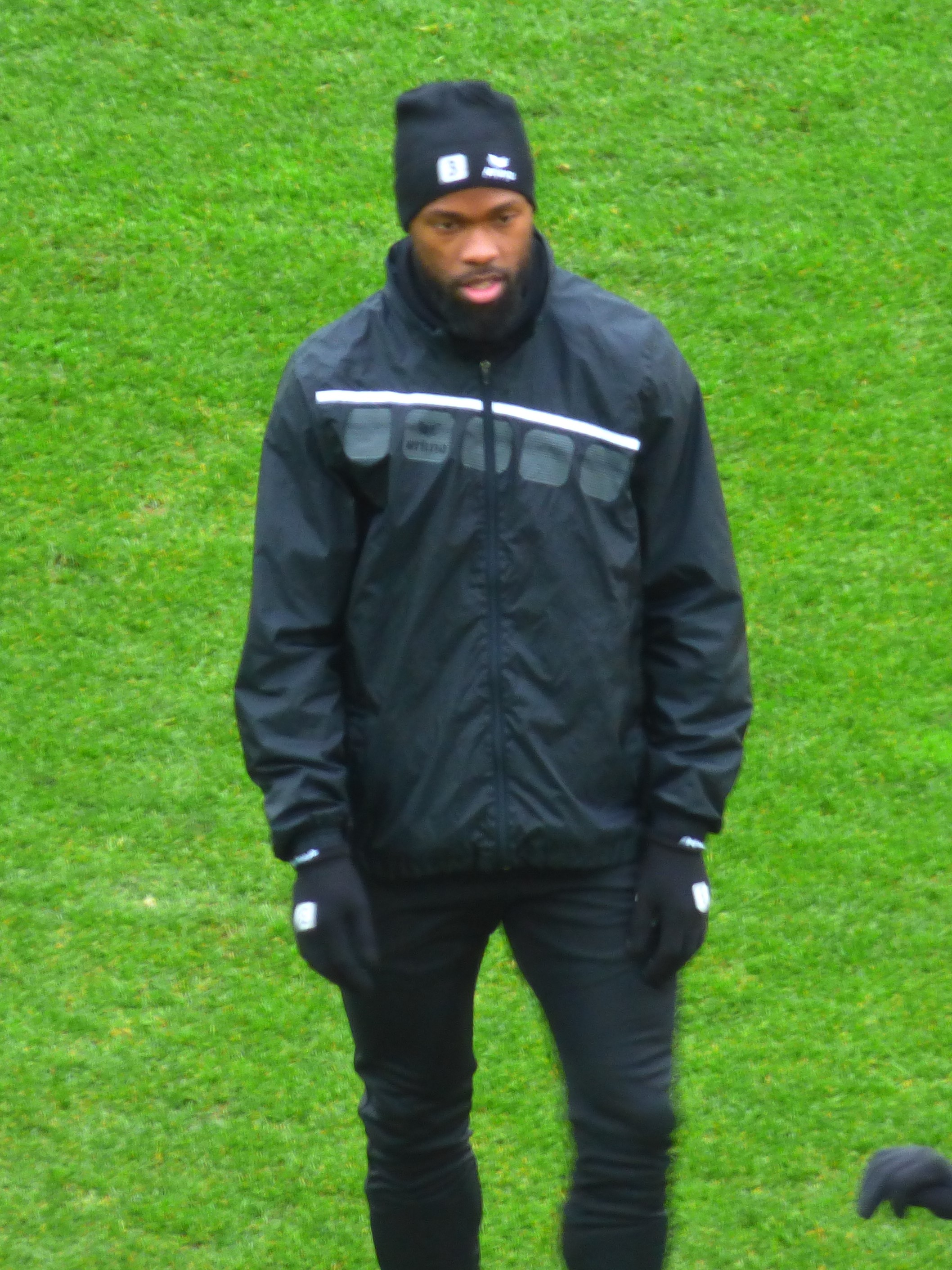 Florian Lapis avant le match Lens / Niort, le 21 décembre 2019, comptant pour la dix-neuvième journée du championnat de France de football de Ligue 2 2019-2020.